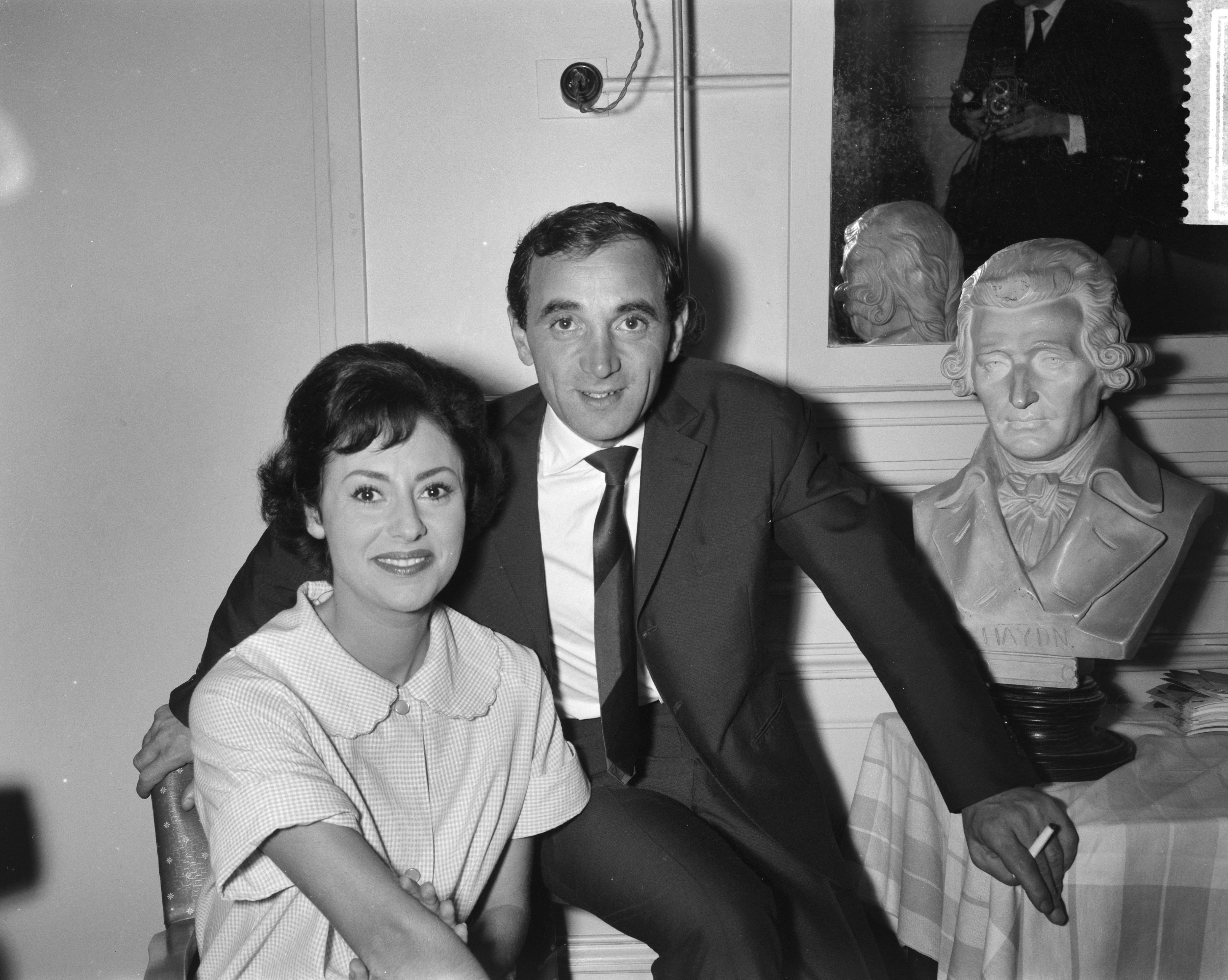 Collectie / Archief : Fotocollectie Anefo Reportage / Serie : Grand Gala Du Disque in het Kurhaus te Scheveningen Beschrijving : Charles Aznavour en Caterina Valente Datum : 30 september 1961 Locatie : Scheveningen, Zuid-Holland Persoonsnaam : Aznavour, Charles, Valente, Caterina Instellingsnaam : Kurhaus Fotograaf : Bilsen, Joop van / Anefo Auteursrechthebbende : Nationaal Archief Materiaalsoort : Negatief (zwart/wit) Nummer archiefinventaris : bekijk toegang 2.24.01.04 Bestanddeelnummer : 912-9919